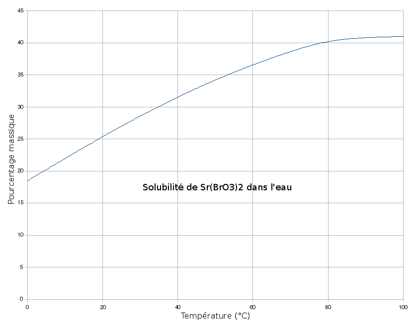 Solubilité de Sr(BrO3)2 dans l'eau en fonction de la température.